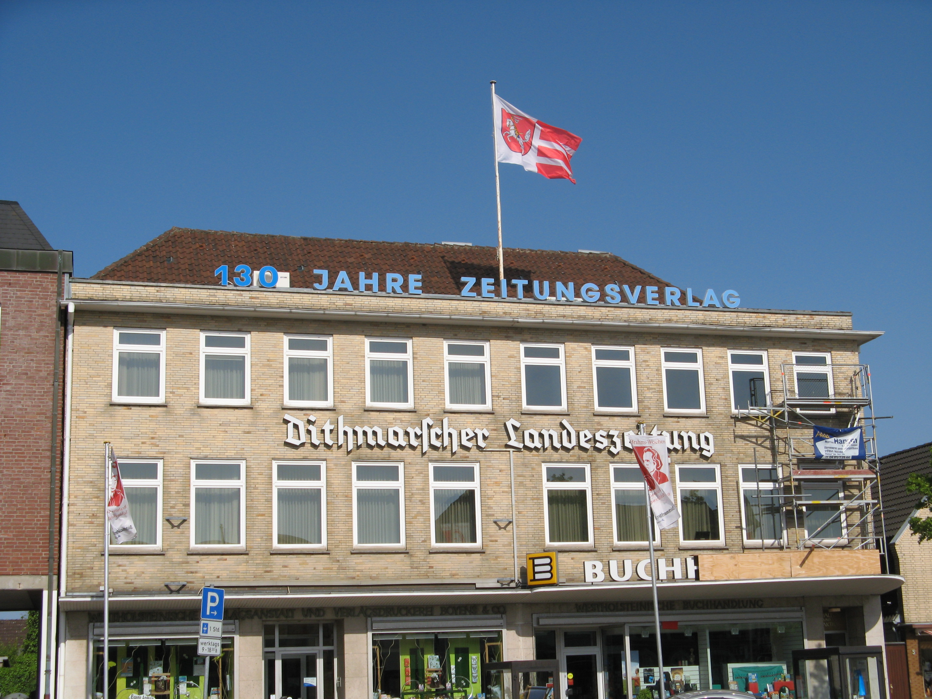 Heide, building of the dithmarscher landeszeitung